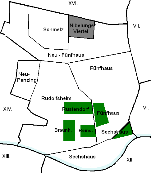 Karte des Nibelungenviertel